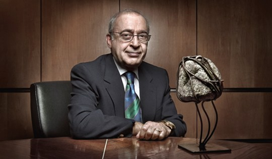 פרופסור לחקר המוח מוסה יודעים